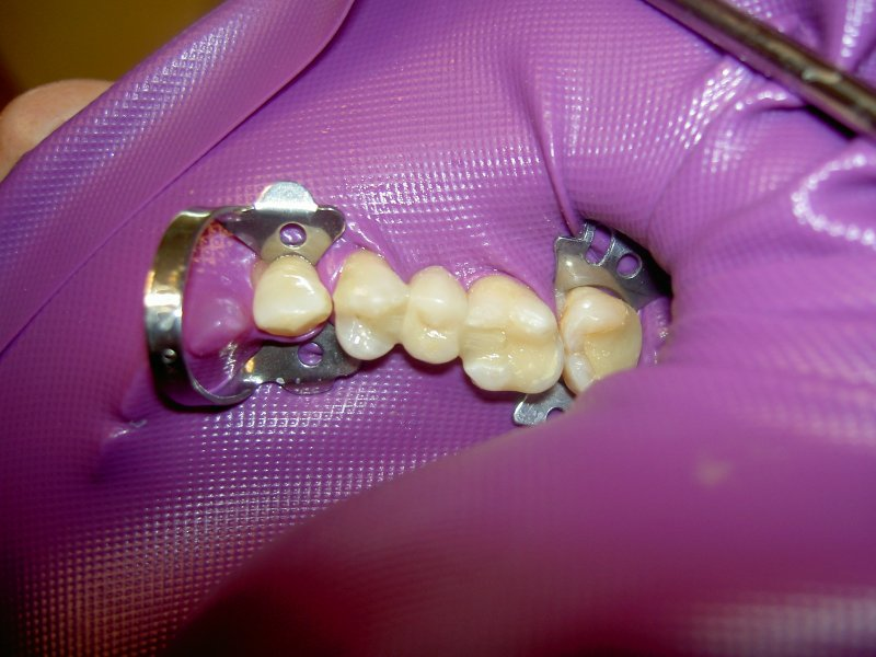 Wklejony most kompozytowy